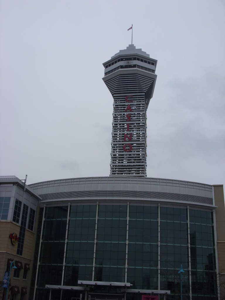 Niagara Region, Ontario